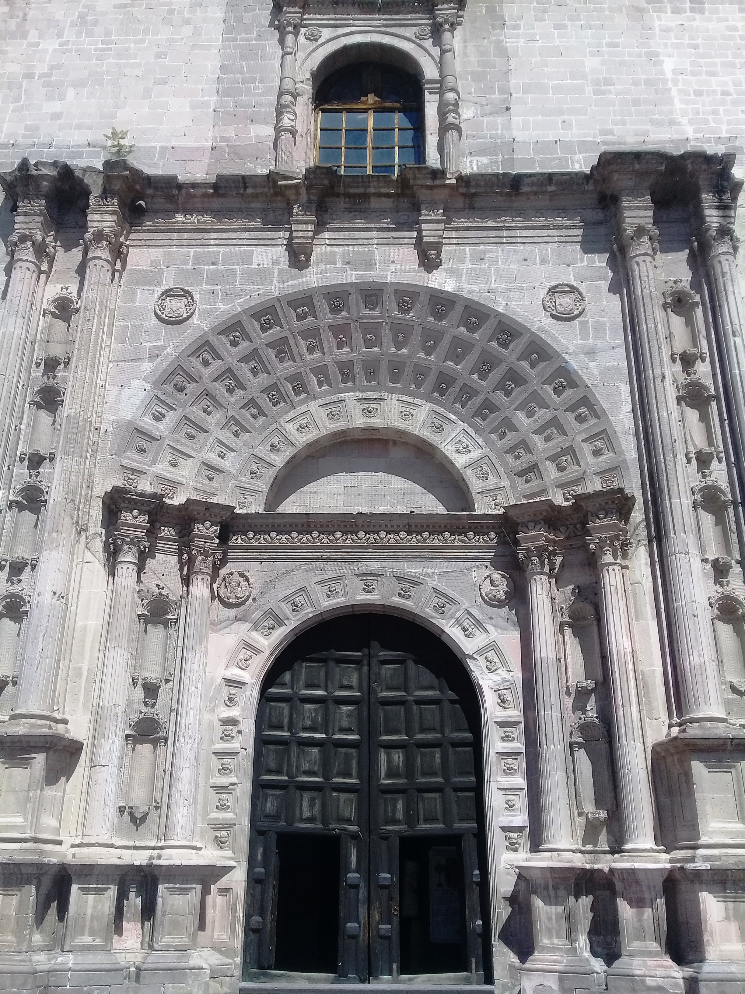 Templo y exconvento de San Nicolás de Tolentino (Actopan).